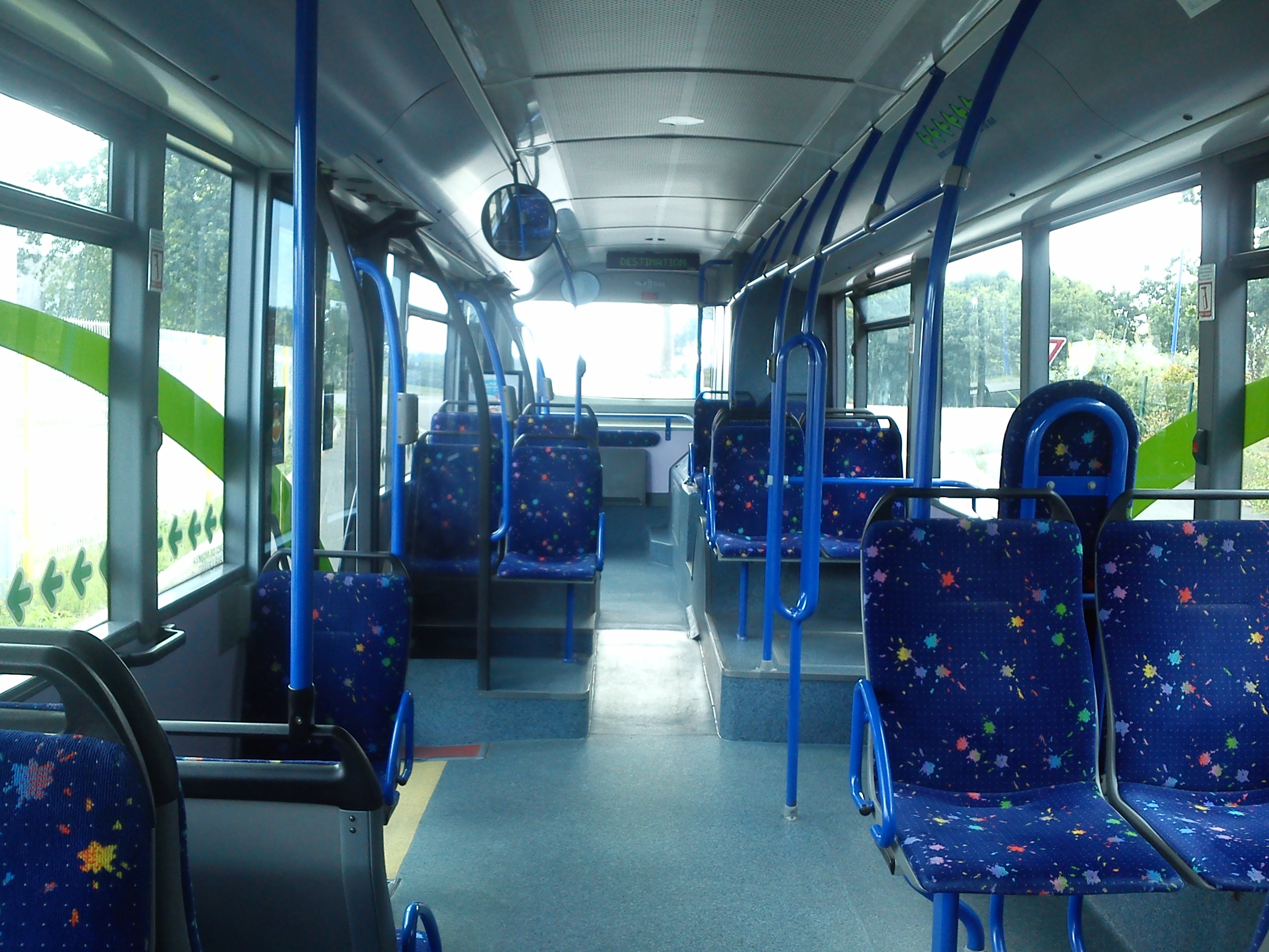 Van Hool NewA330 intérieur